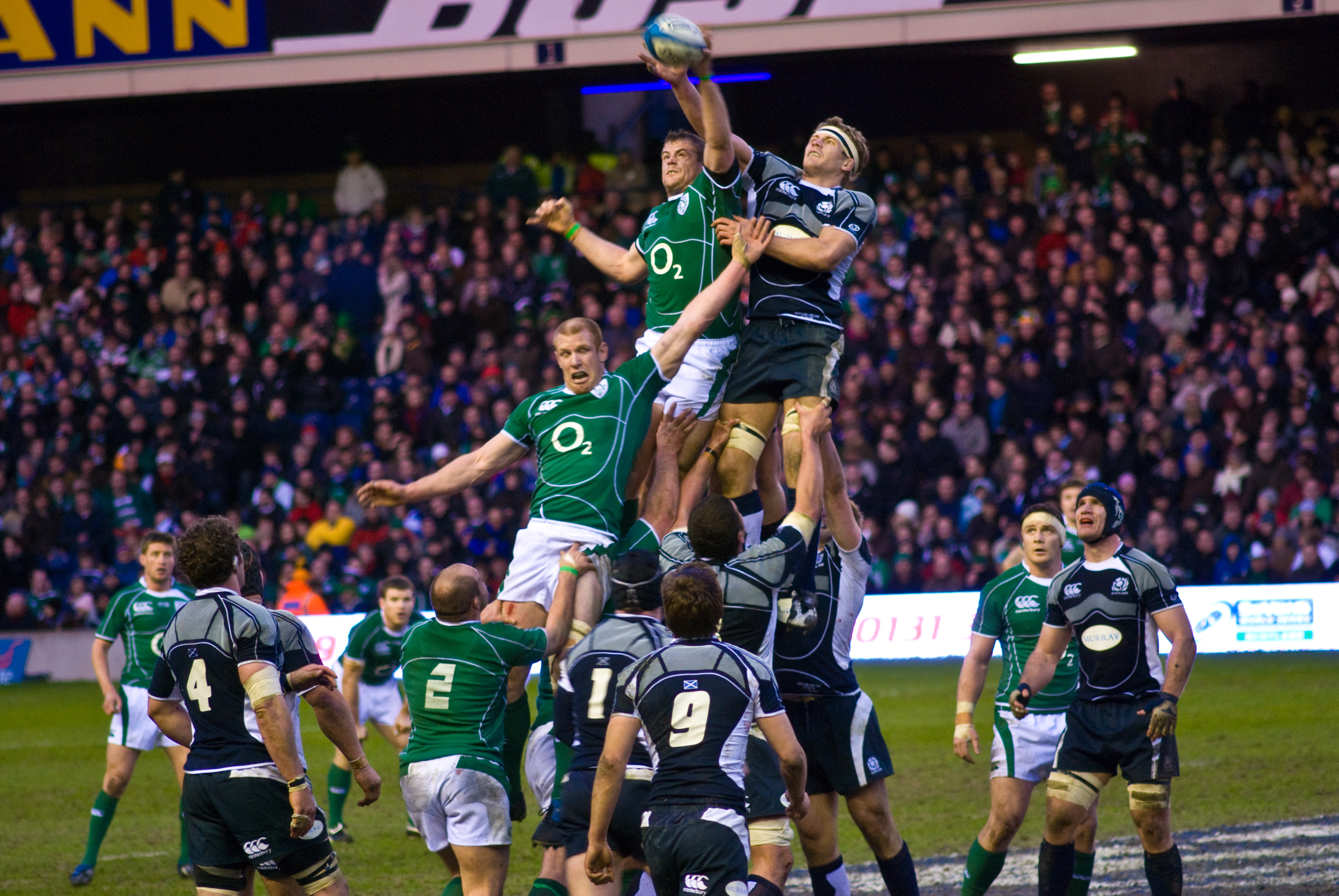 2009ko Sei Nazioen Torneoko Eskoziako eta Irlandako errugbi selekzioen partidako irudia.